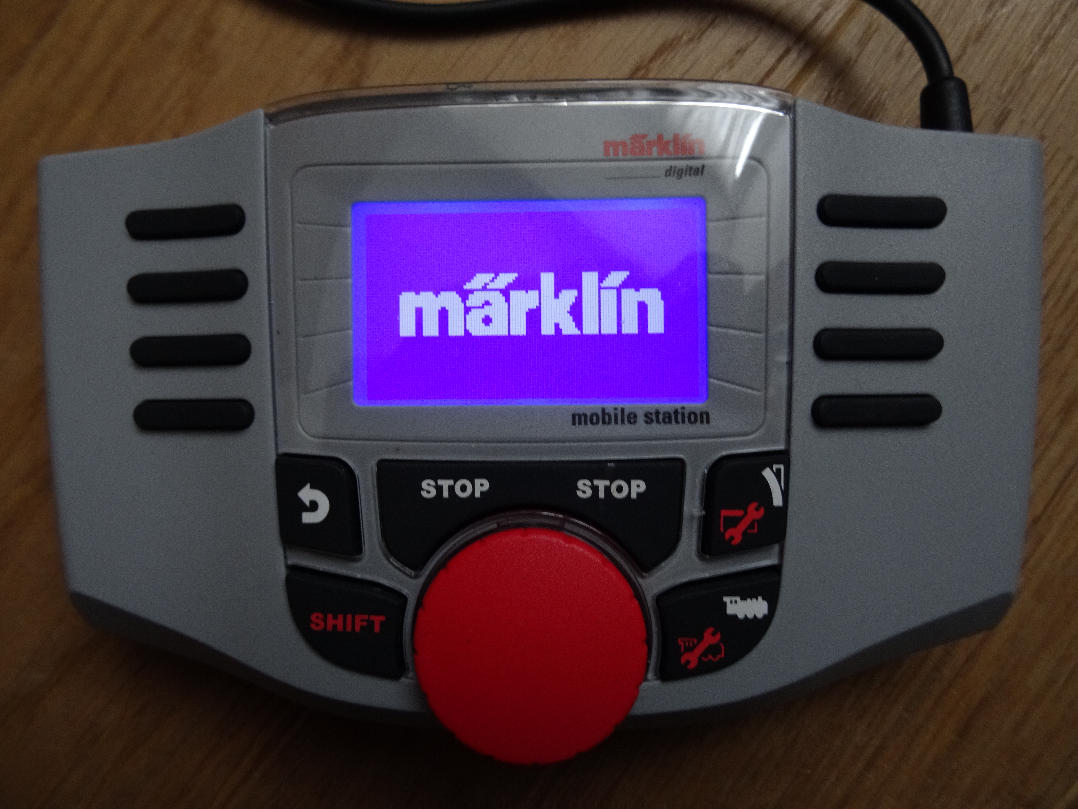 Unité de commande de trains miniature de Märklin